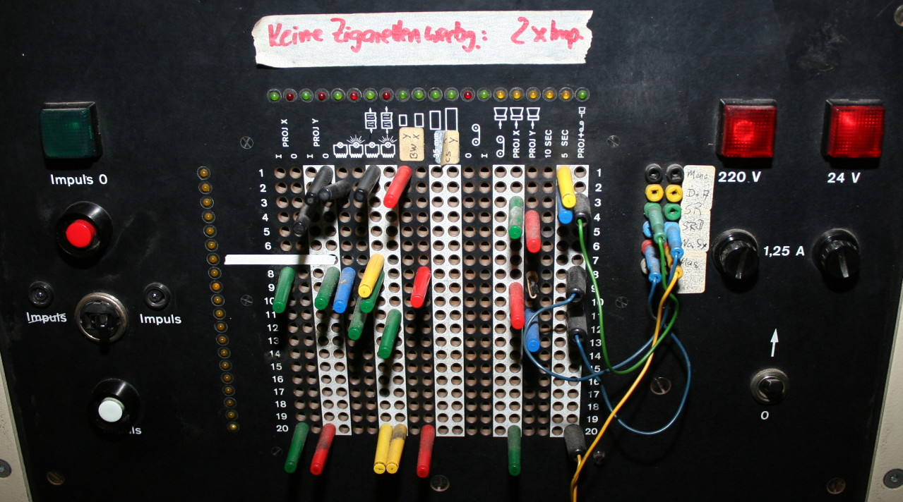 Matrixautomat